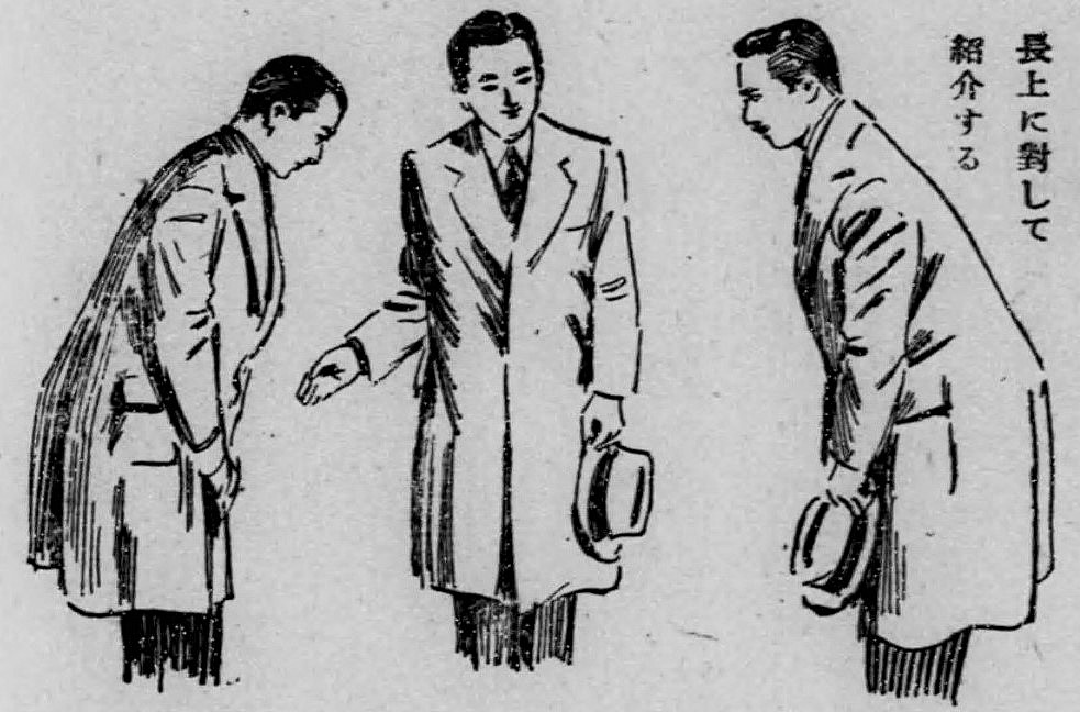 目上の人を目下の人に紹介する